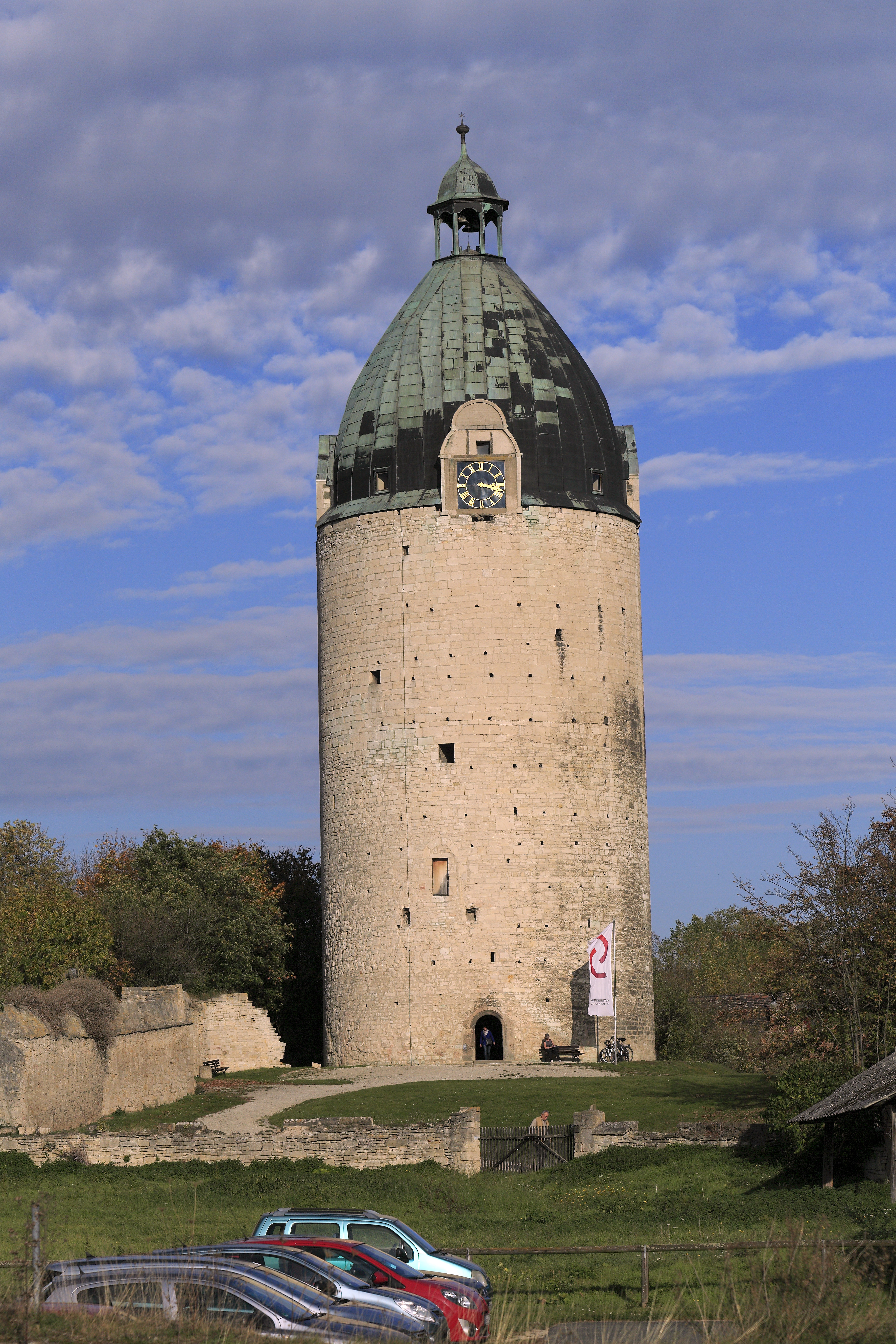 Vom Zaun der Kernburg, der insbesondere das Museumsgelände abgrenzt, der Turm hat weder eine Plattform noch großflächige Fenster.Sondervorteil: Mit dem Fahrrad kommt man bis unmittelbar vor die Tür.